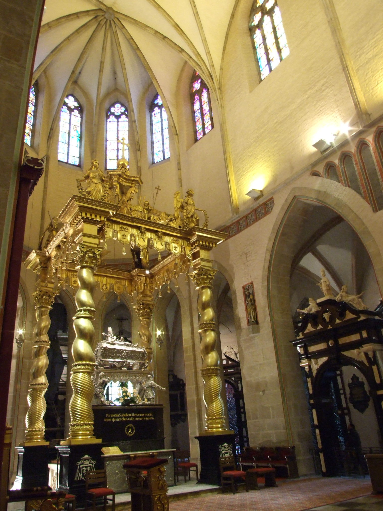 Gniezno - Katedra p.w. Wniebowzięcia NMP